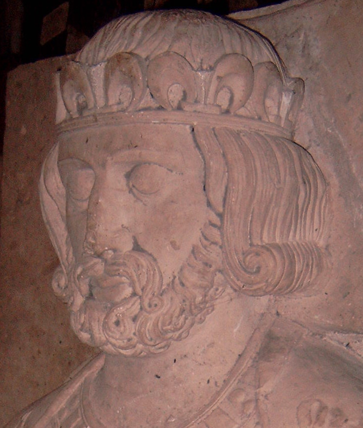 Filip I. Francouzský